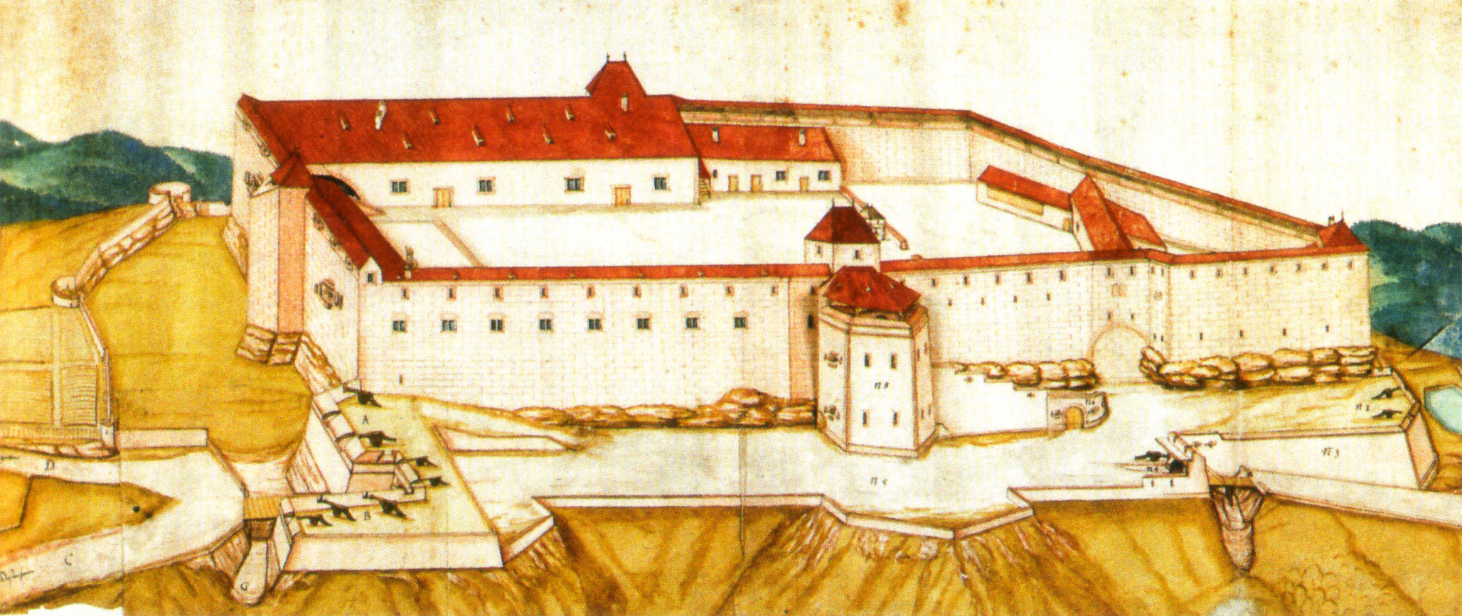 Aquarellierte Federzeichung mit einem Entwurf für die Verstärkung der elsässischen Burg Herrenstein